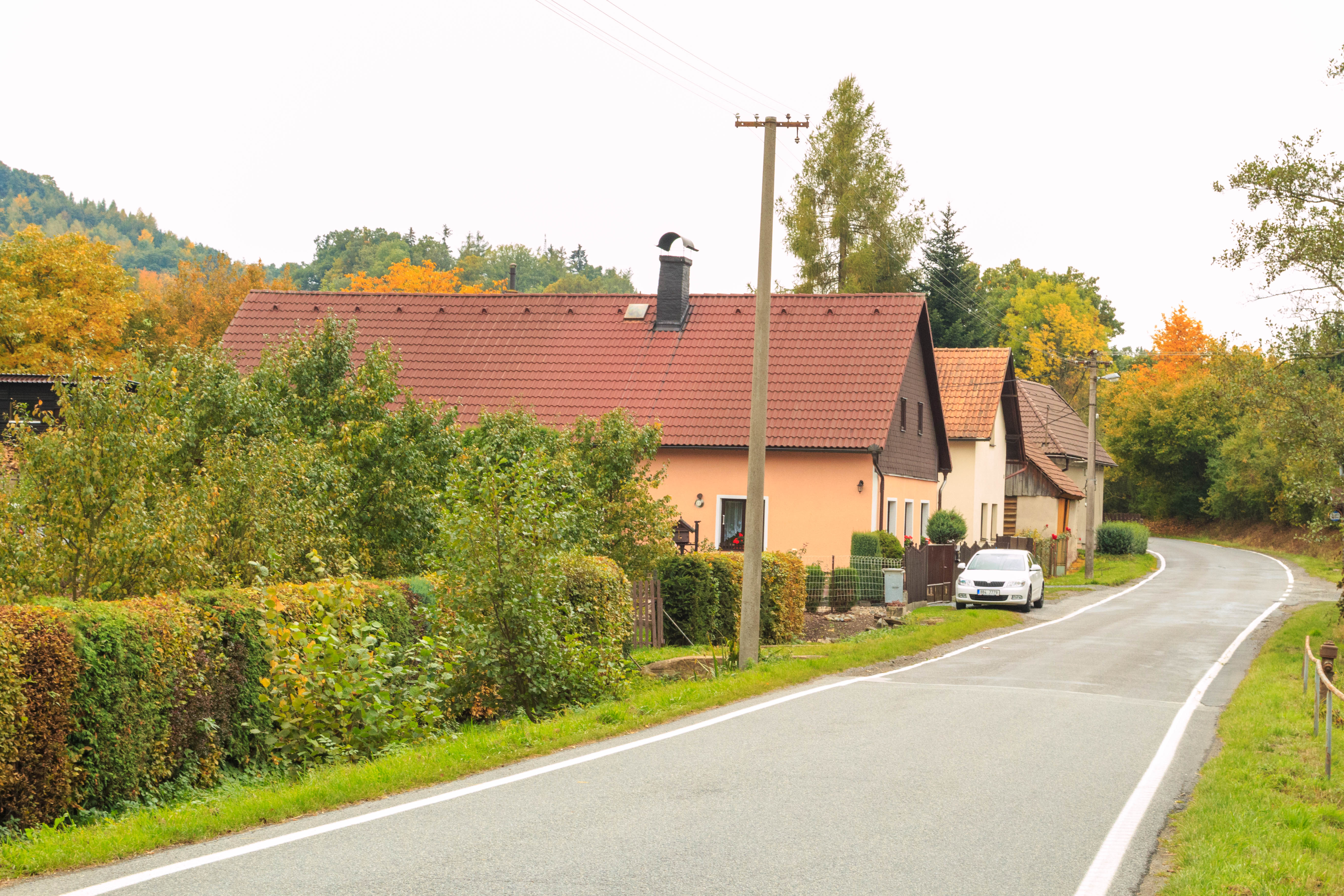 Hranice čp. 14